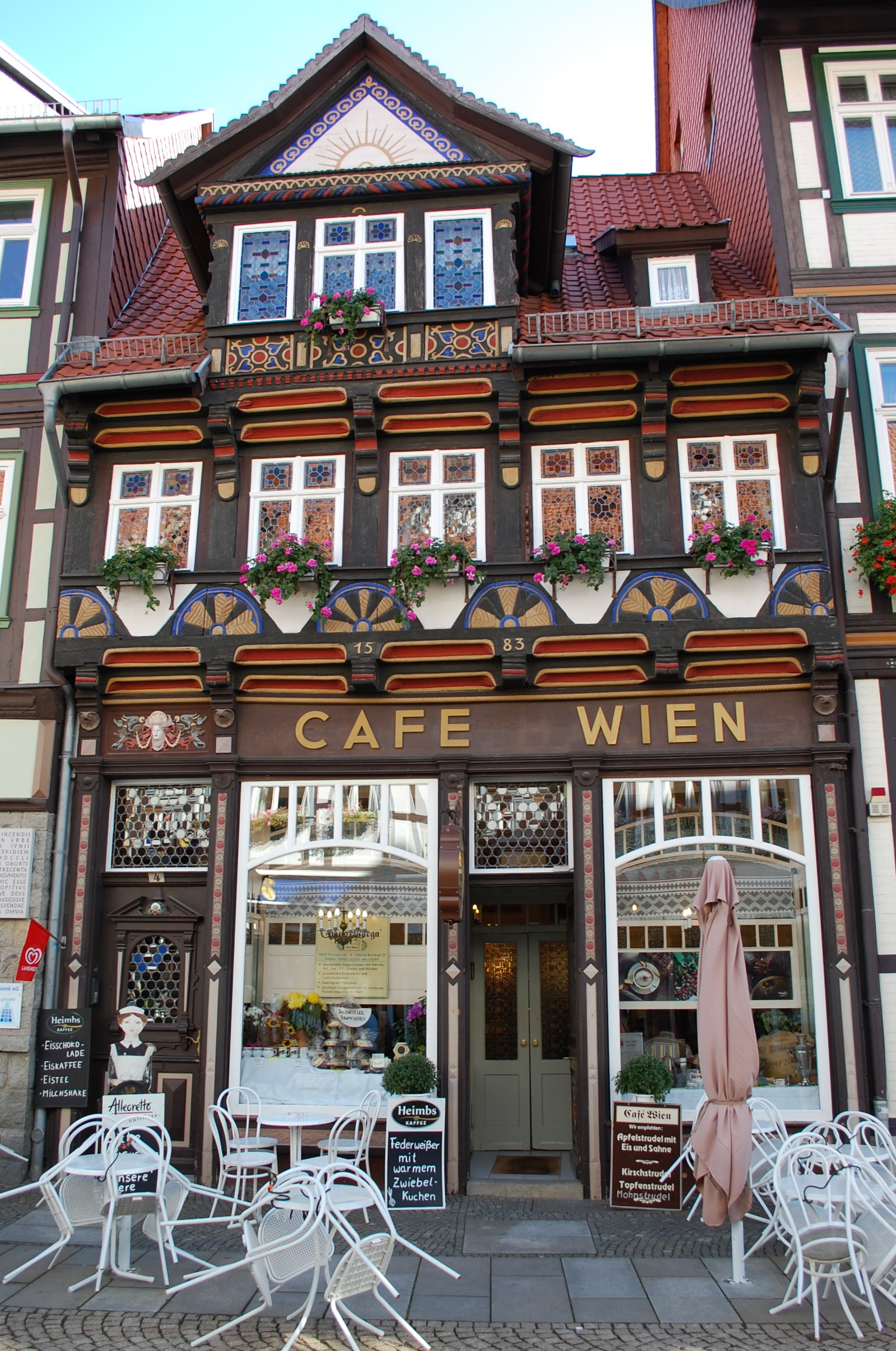 Cafe Wien in Wernigerode